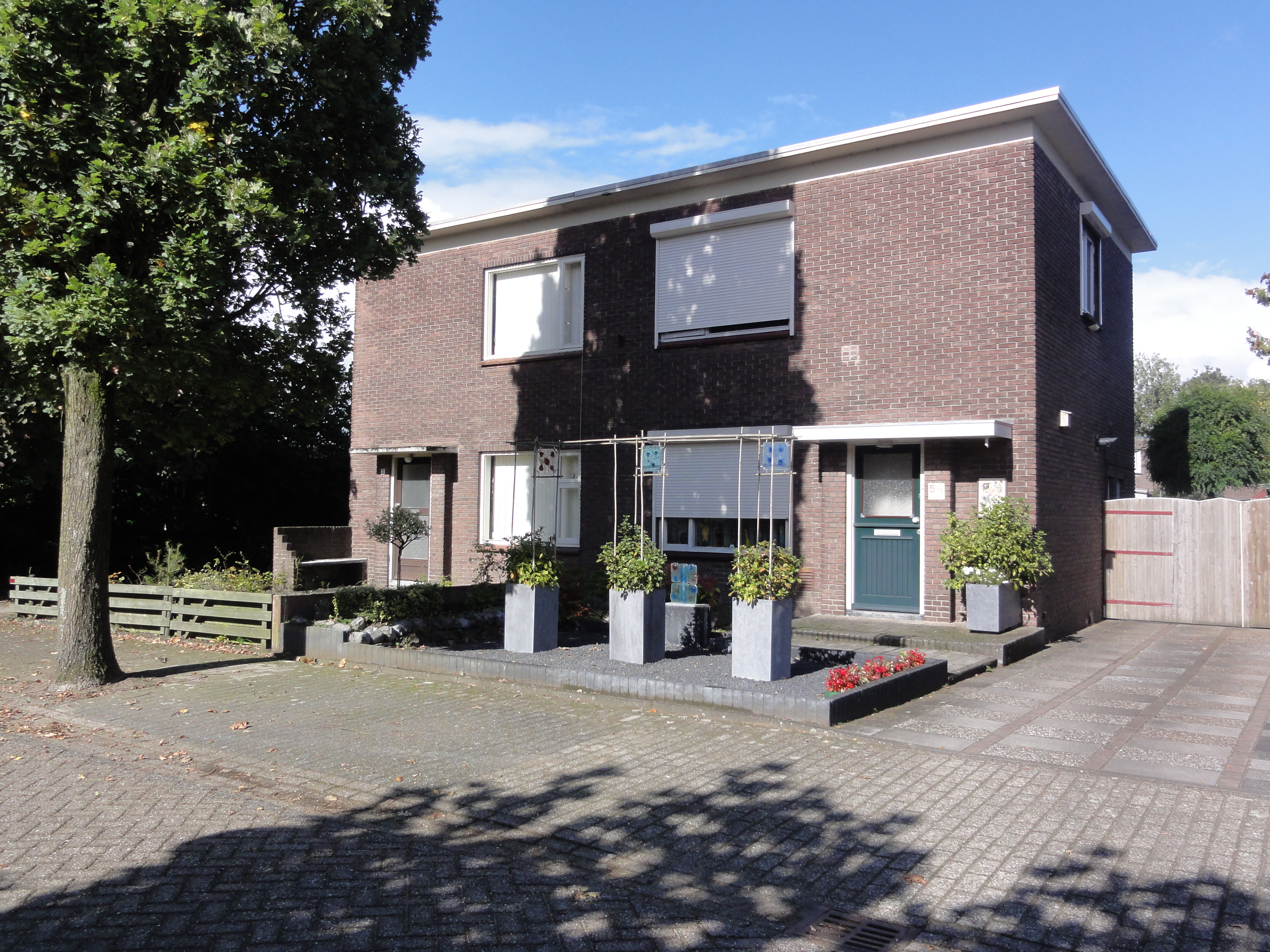 Best Rijksmonument 512324 BATA-dorp, Batalaan 5 Van der Sangen.